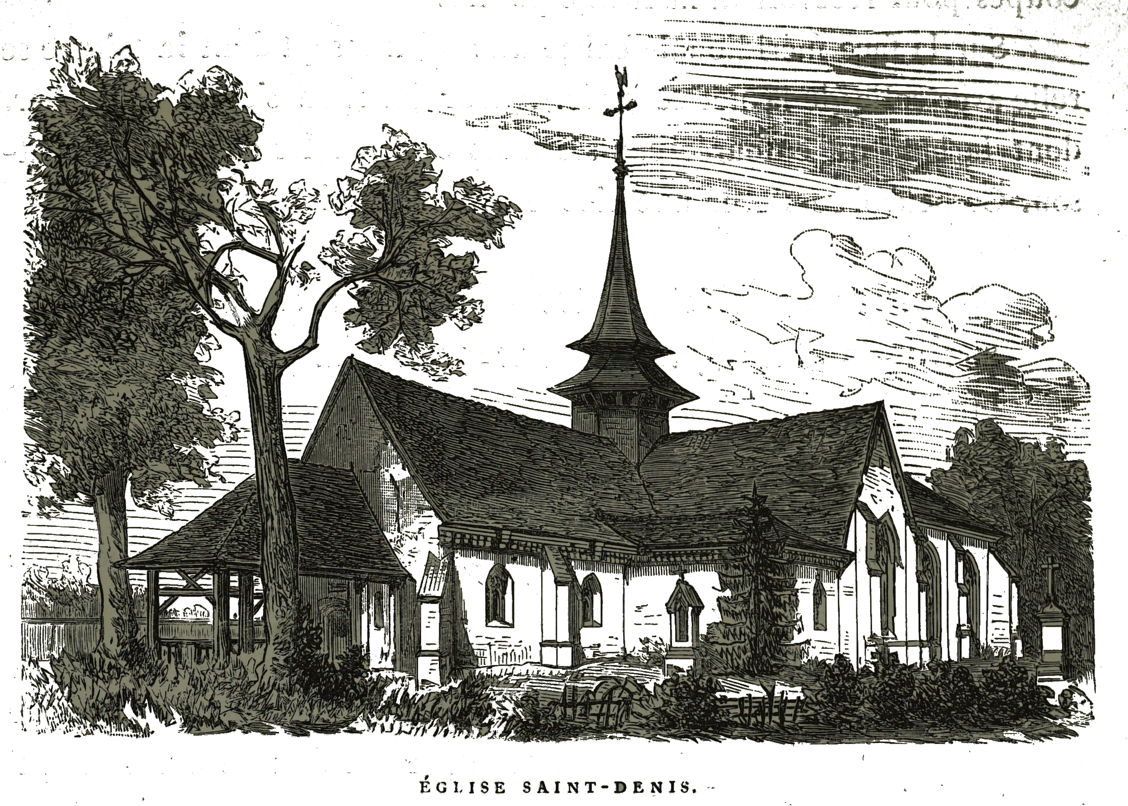 par un dessin de Fichot.